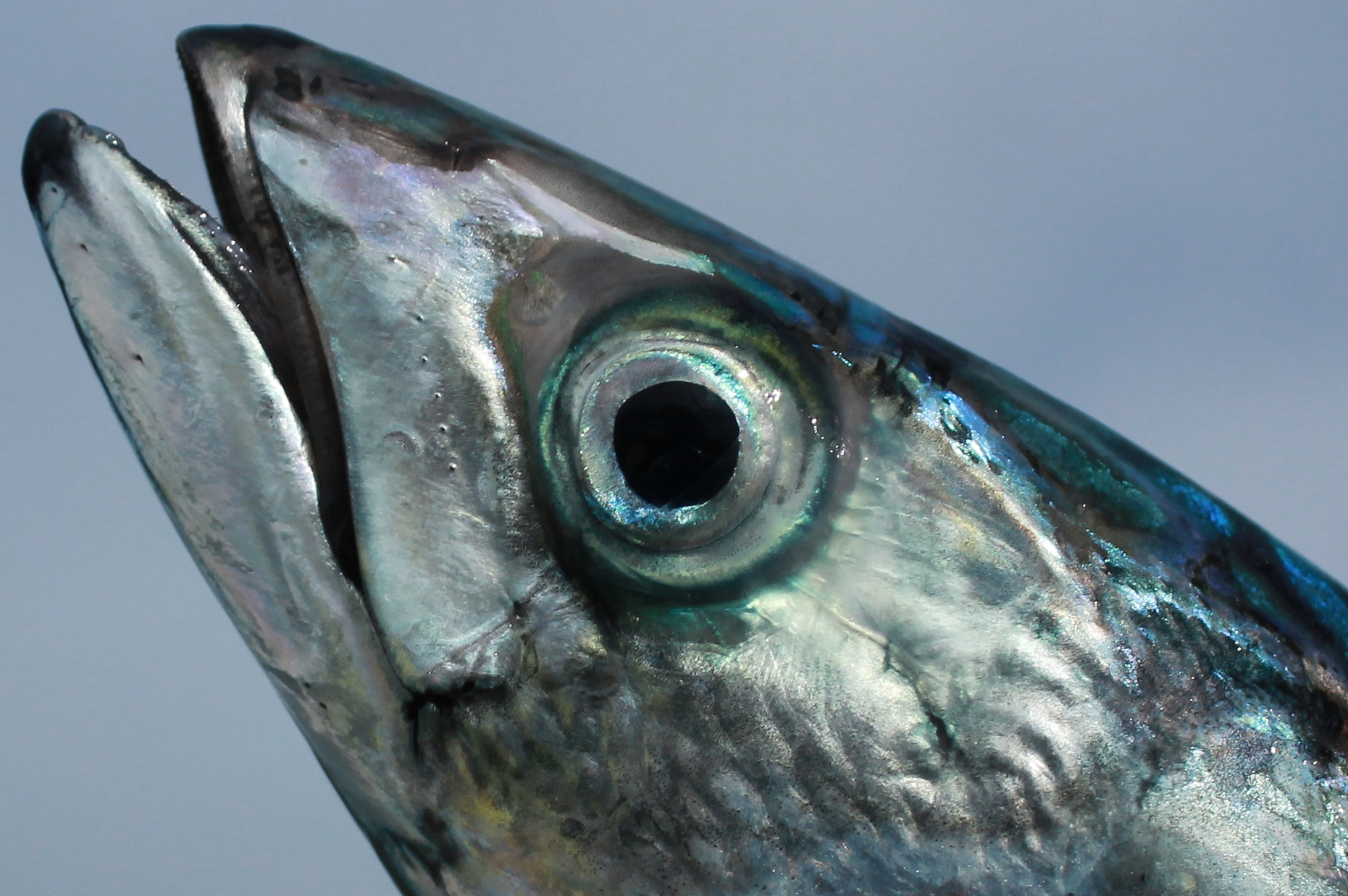 Makrele. Fischfang in Norwegen. Insel Tysnes.